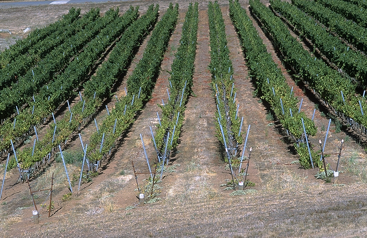 Reblausbefallsherd in einem Weingarten - im vorderen Bereich des Weingartens mit Lyraerziehung sichtbar. Grund war die Verwendung der ungenügend resistenten Unterlage AxR 1 in Kalifornien.